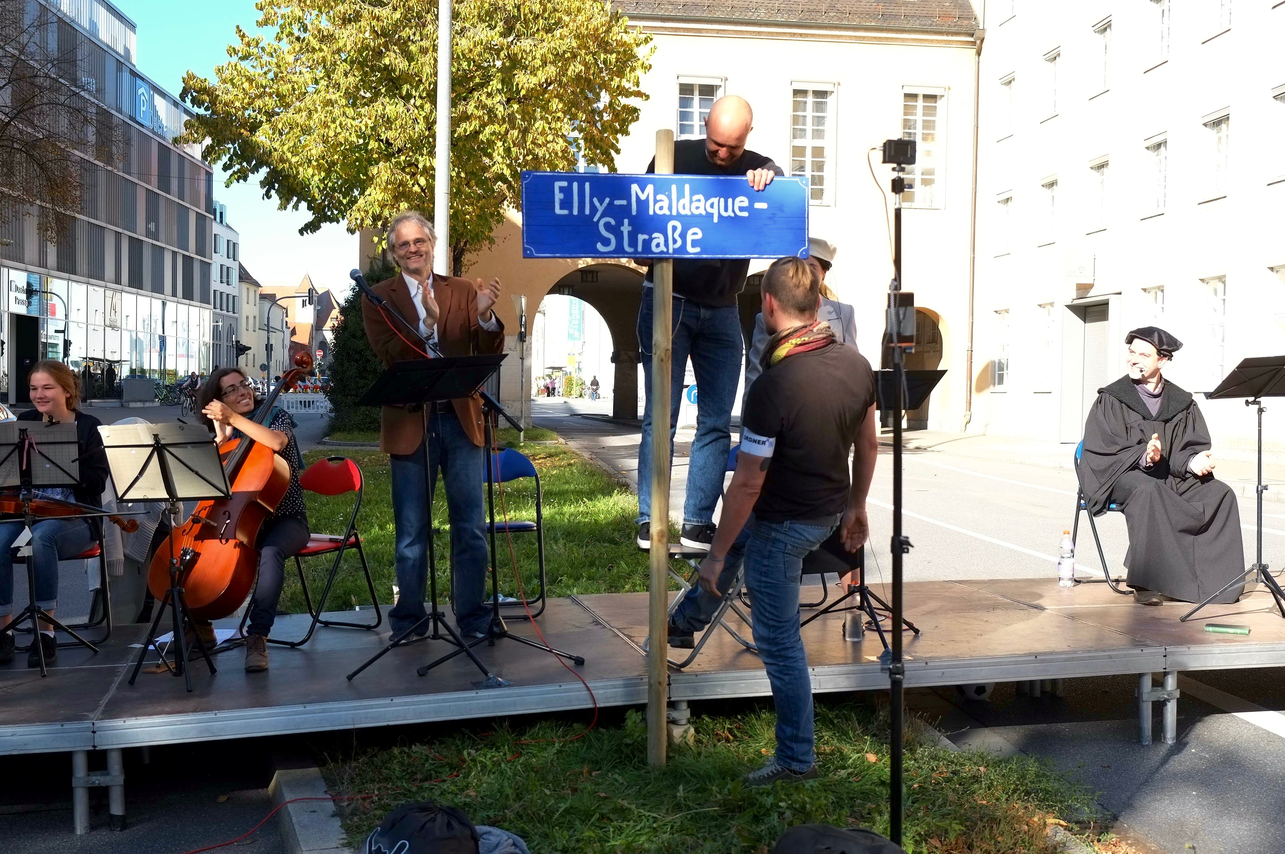 Im Rahmen einer Kundgebung zur Umbenennung der D.-Martin-Luther-Str. in Elly-Maldaque-Str. wurde vom ueTheater Regensburg das Theaterstück "Liebe statt Hass" am 15.10.2017 vor dem Regensburger Rathaus aufgeführt.